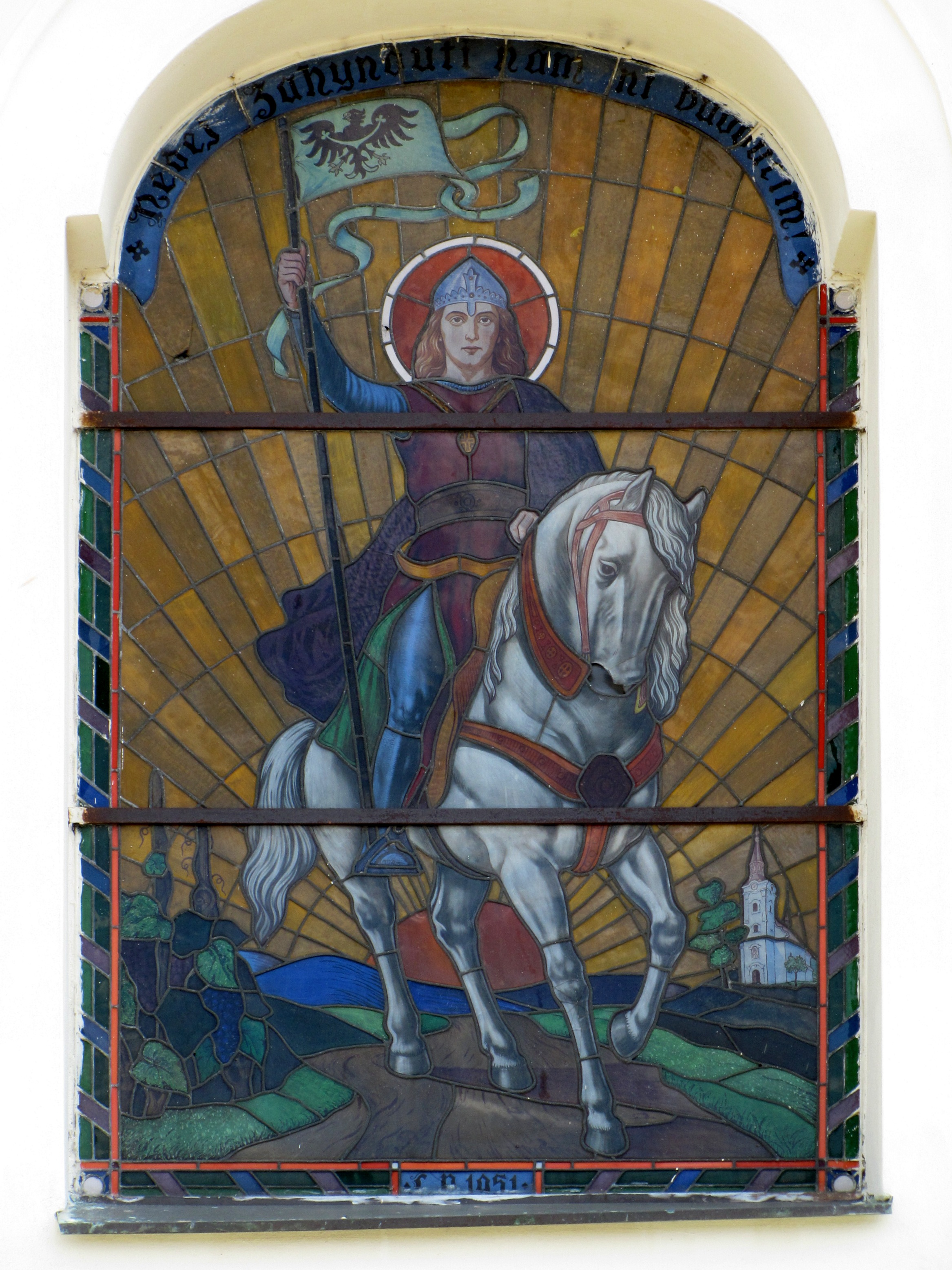 Vitráž nad vstupem do kostela sv. Václava v Kostelci u Kyjova, okres Hodonín. Svatý Václav na bílém koni, nad ním nápis "Nedej zahynouti nám ni budoucím!" L.P. 1951